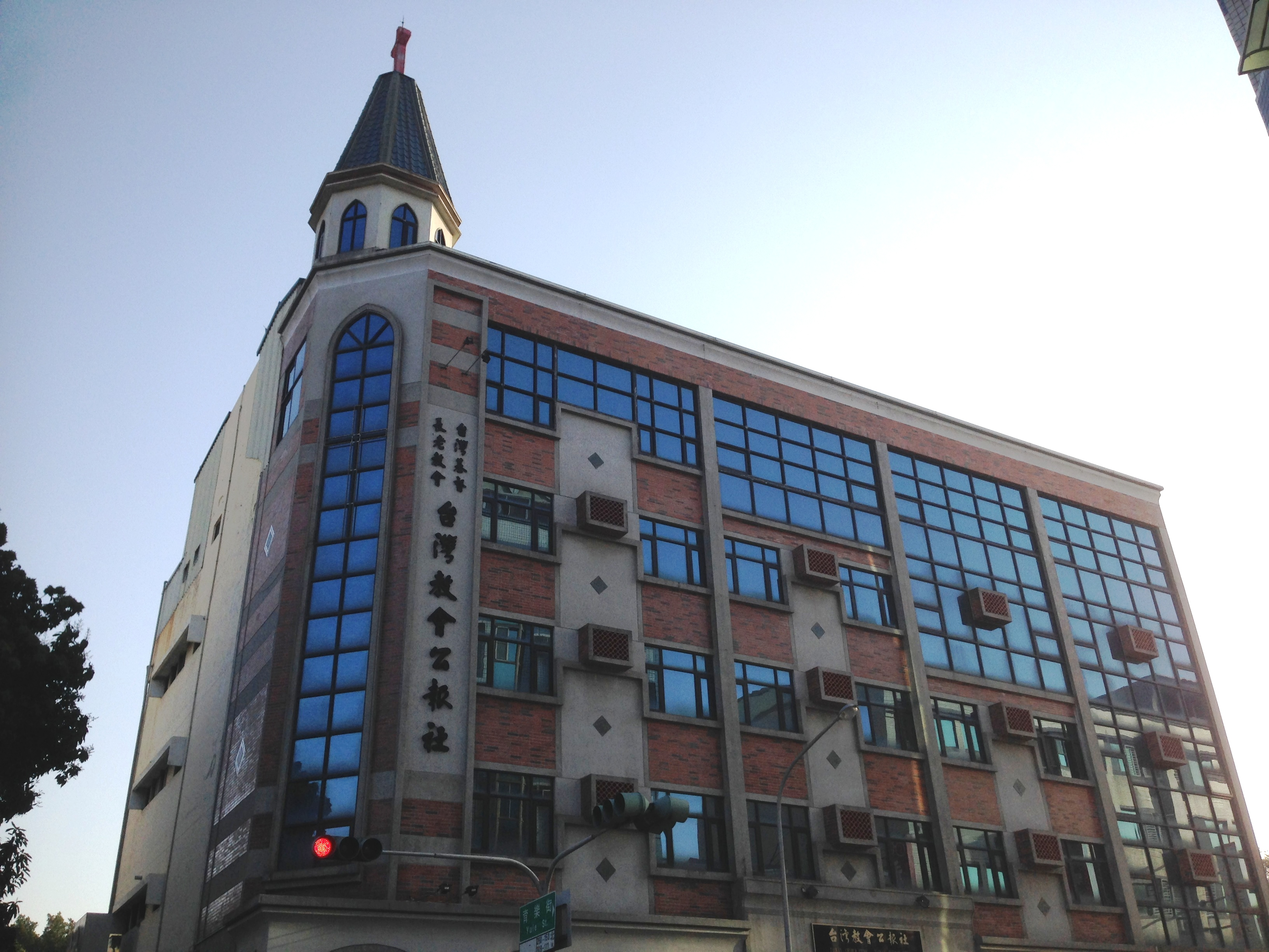 中文（台灣）: 台灣基督長老教會台灣教會公報社總社，位於臺南市東區青年路334號。